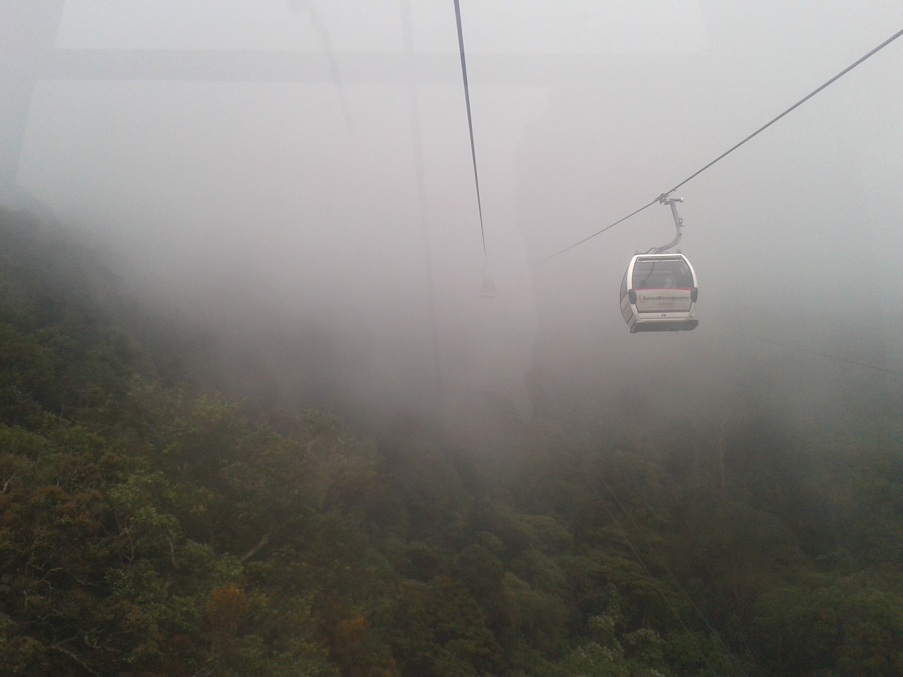 El teleférico del parque nacional Waraira Repano, estación Maripérez